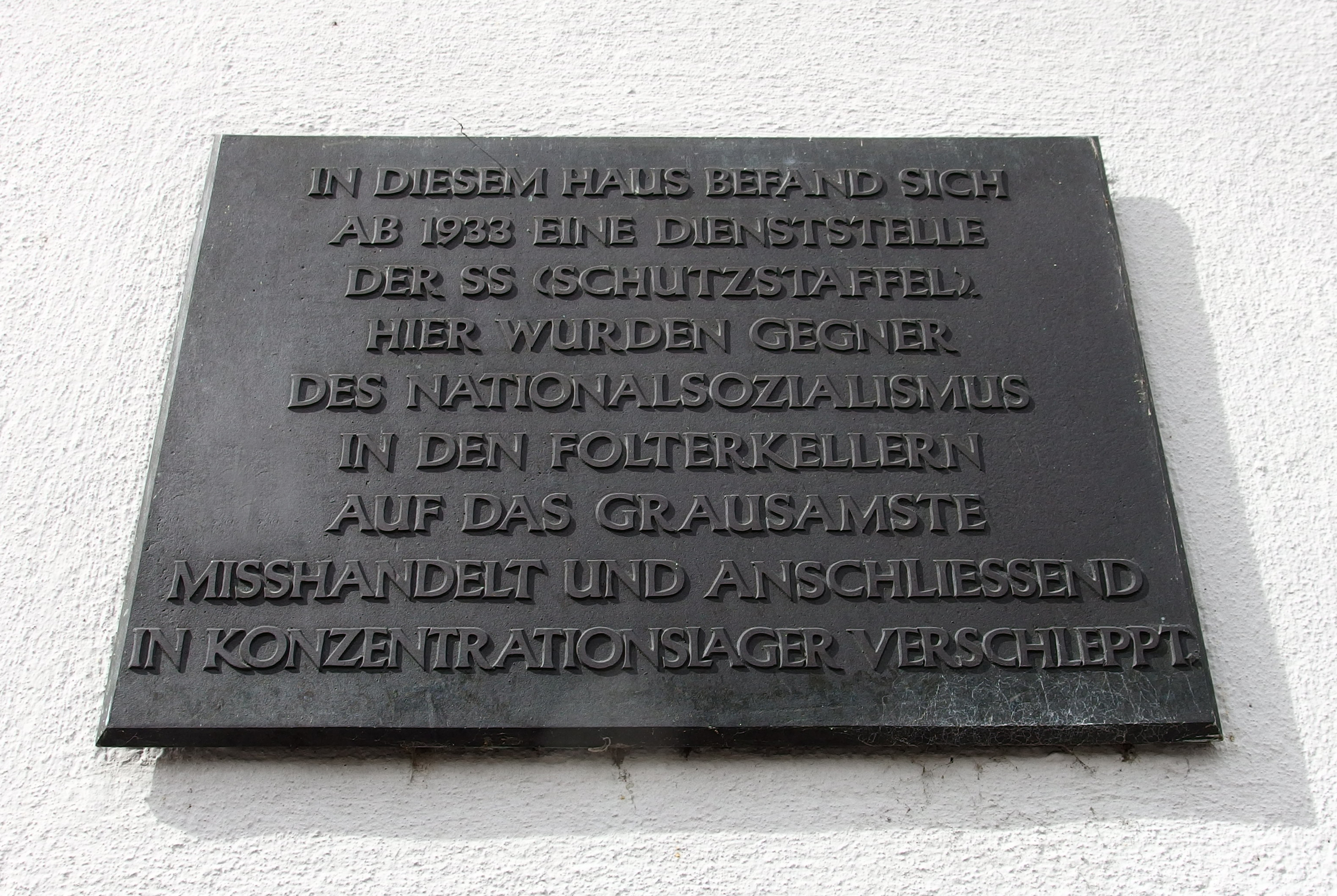 Gedenktafel Reuterkaserne 1, Düsseldorf-Altstadt: in diesem Haus befand sich ab 1933 eine Dienststelle der SS (Schutzstaffel). Hier wurden Gegner des Nationalsozialismus in den Folterkellern auf das grausamste misshandelt und anschließend in Konzentrationslager verschleppt.